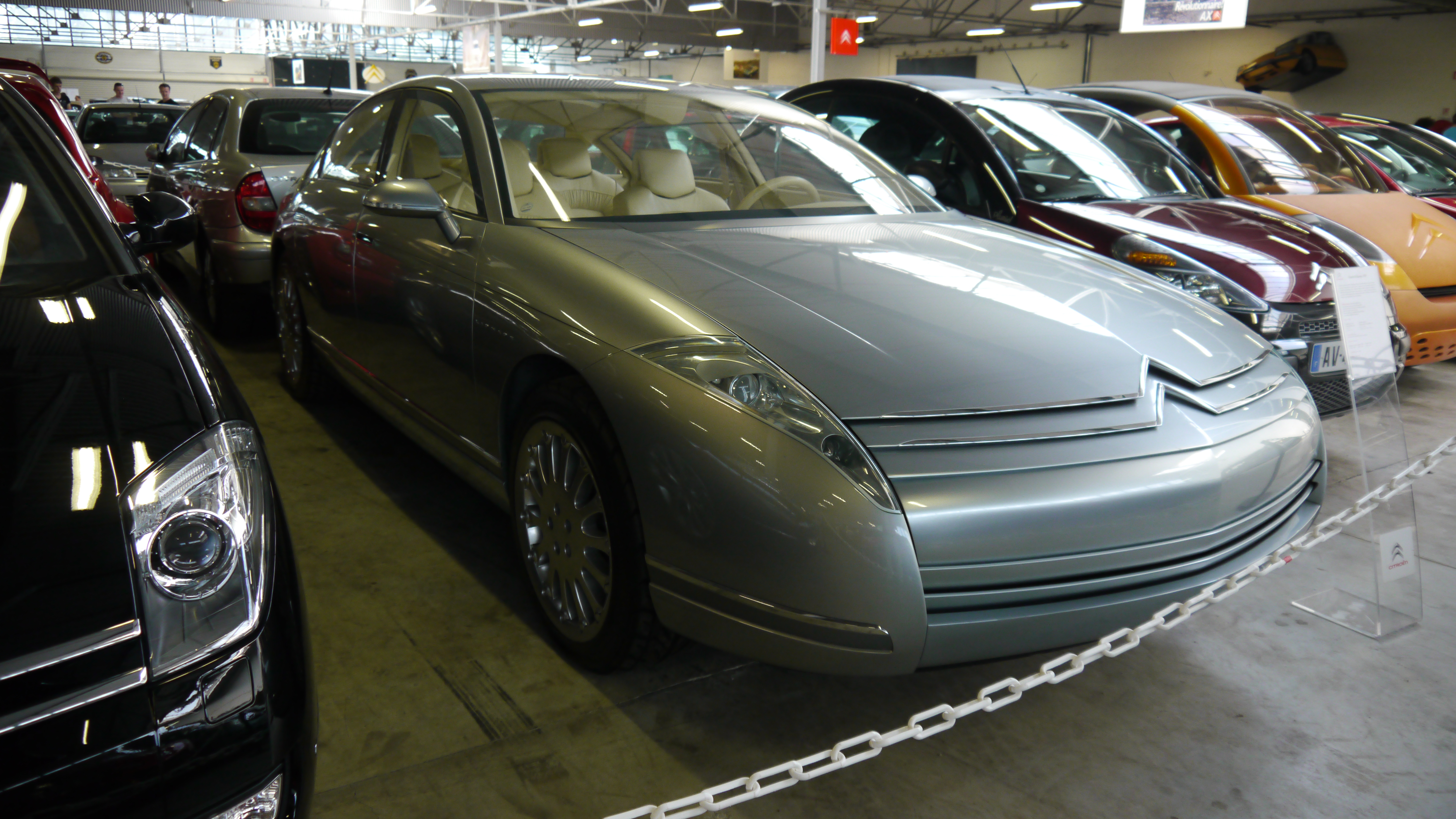 Conservatoire Citroen 230 Citroen Lignage